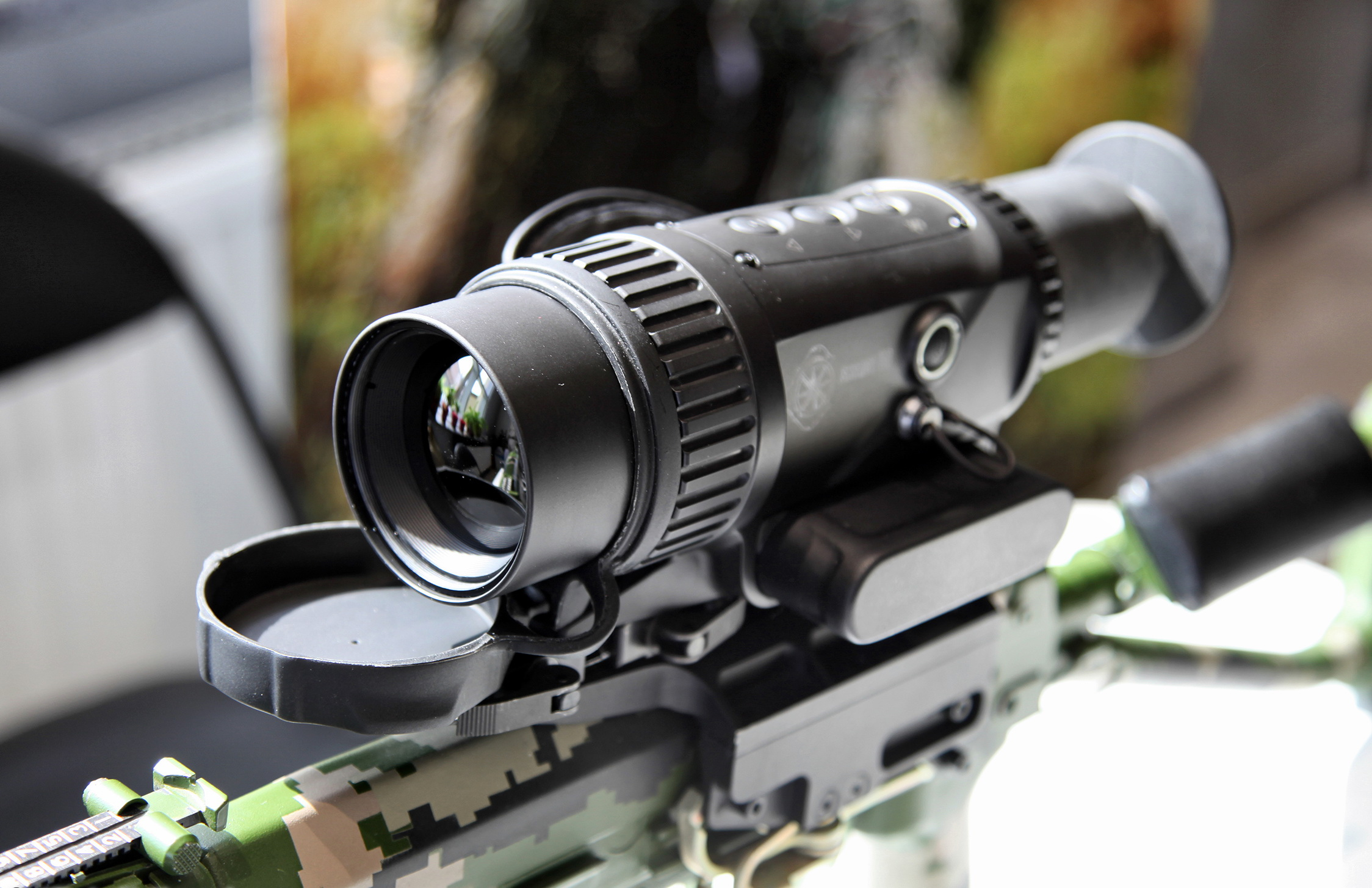 Тепловизионный прицел Сканда 60, страница прибора на официальном сайте производителя